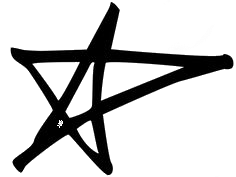 Estrella usada en algunos logotipos de la cantante canadiense Avril Lavigne.